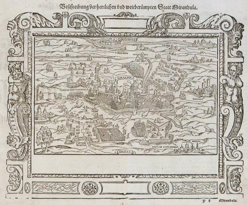 Иллюстрация из "Космографии" Себастьяна Мюнстера